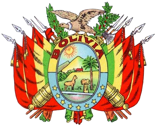 Terceiro Brasão de Armas Nacional da Bolívia